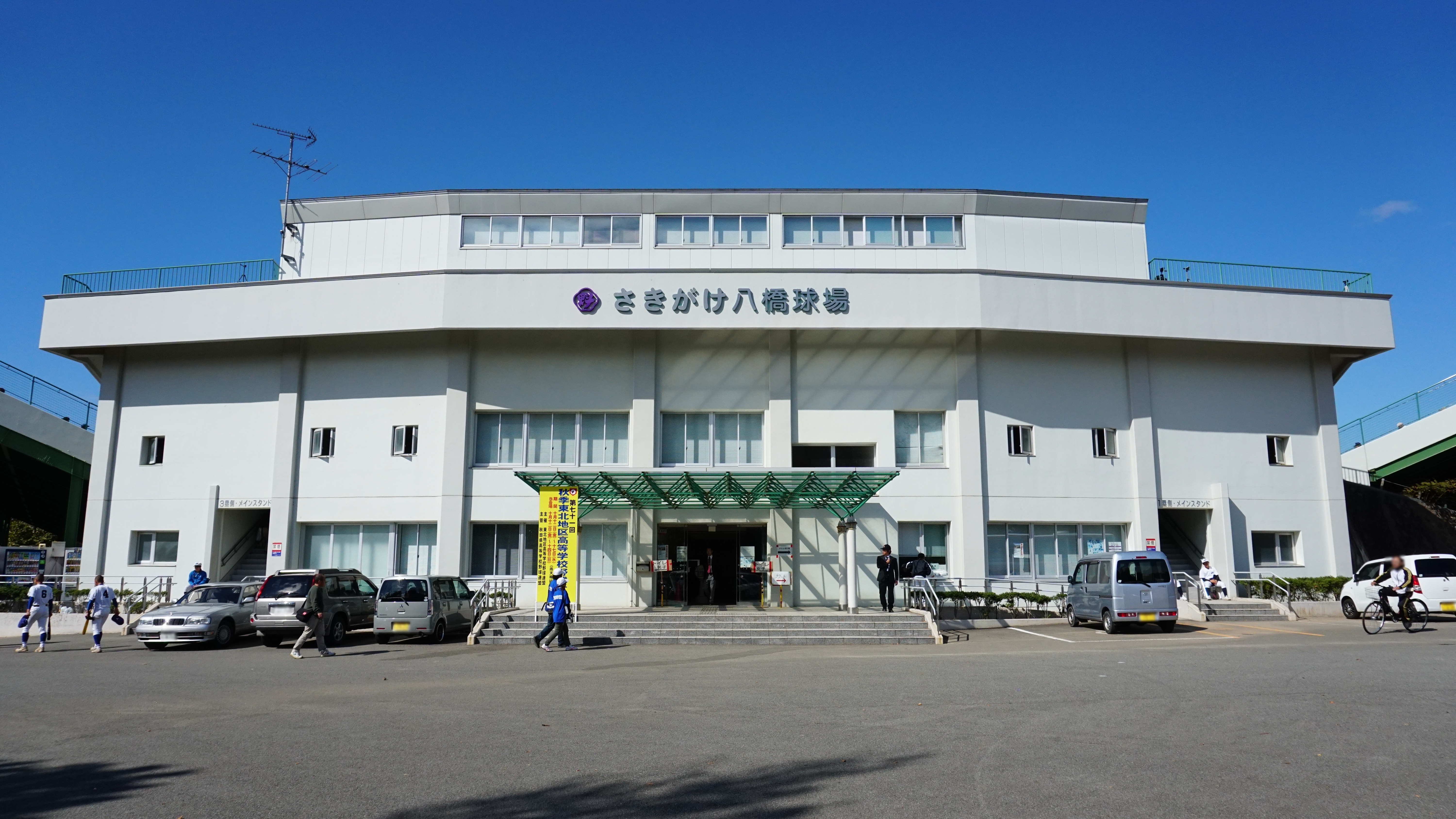 秋田市八橋運動公園硬式野球場（※2016年より秋田魁新報社が命名権を取得し「さきがけ八橋球場」）建物正面